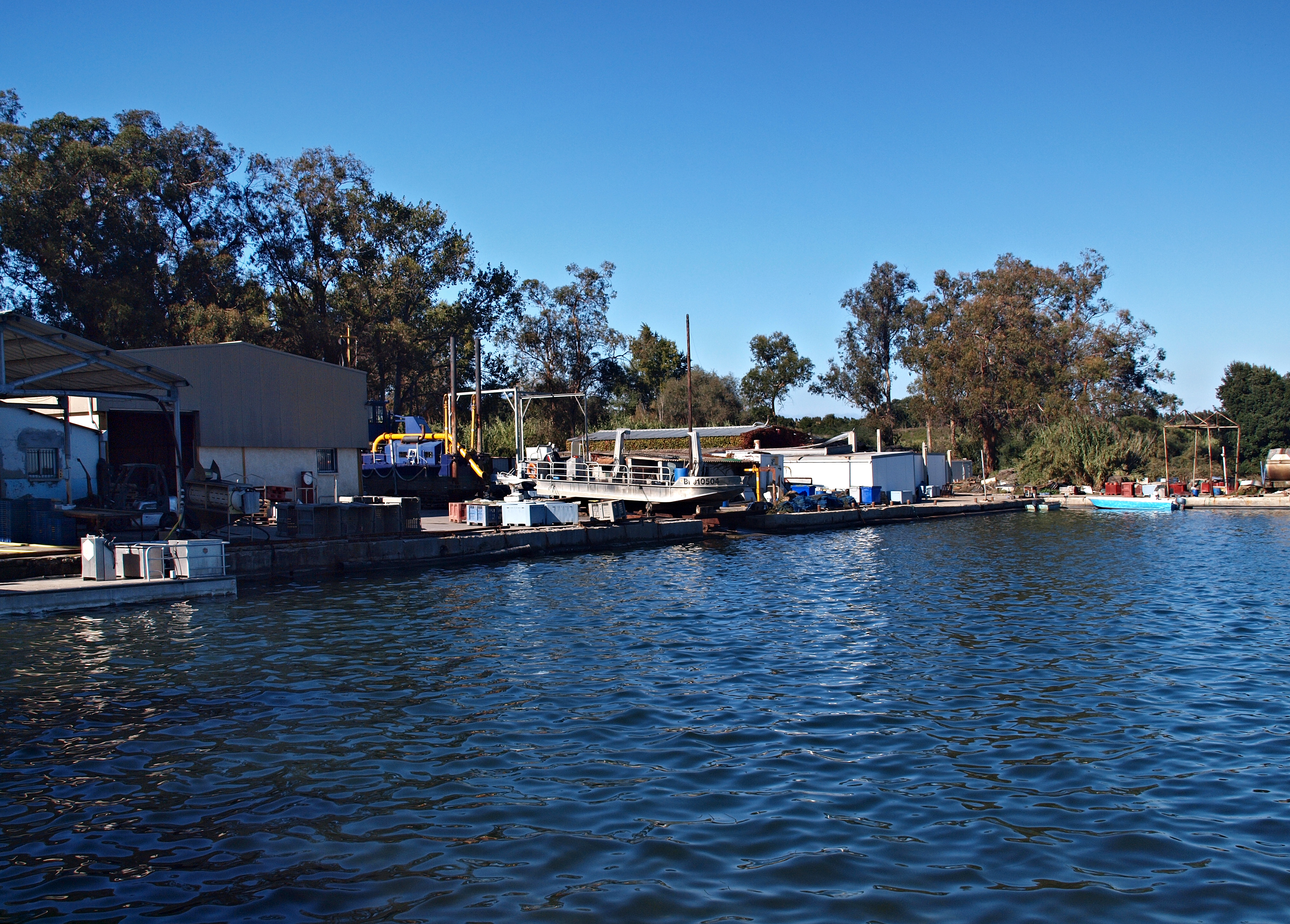 Aléria (Corsica) - Une structure professionnelle de l'Étang de Diana